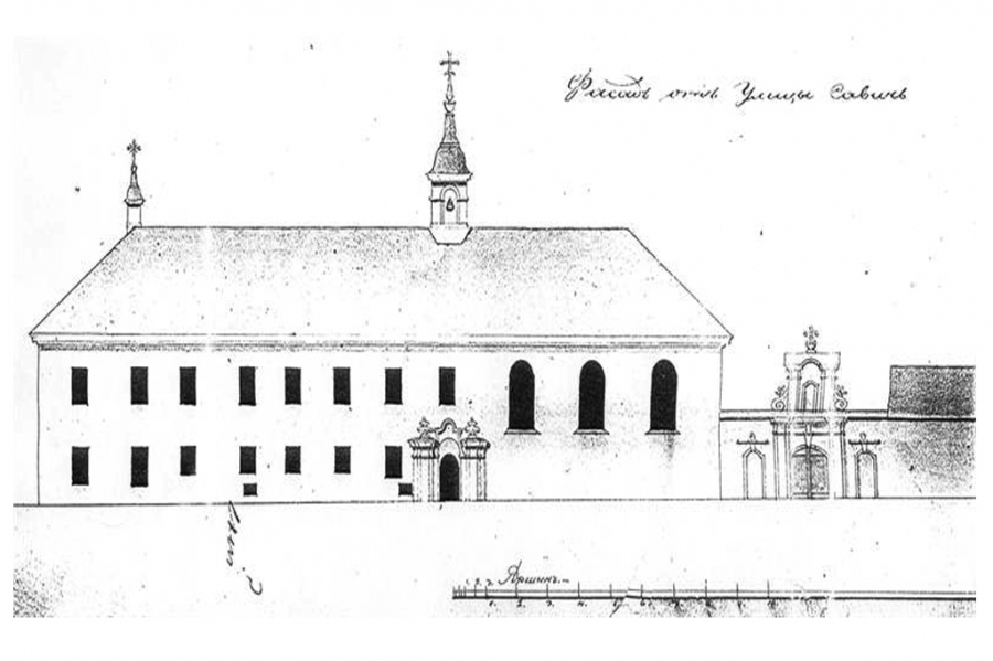 Беларуская (тарашкевіца): Вільня (Vilnia), вуліца Савіч (vulica Savič), цяпер Бакшта (vulica Bakšta). Шпіталь і капліца сясьцёр міласэрнасьці (шарытак)